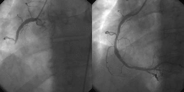 Bildbeschreibung